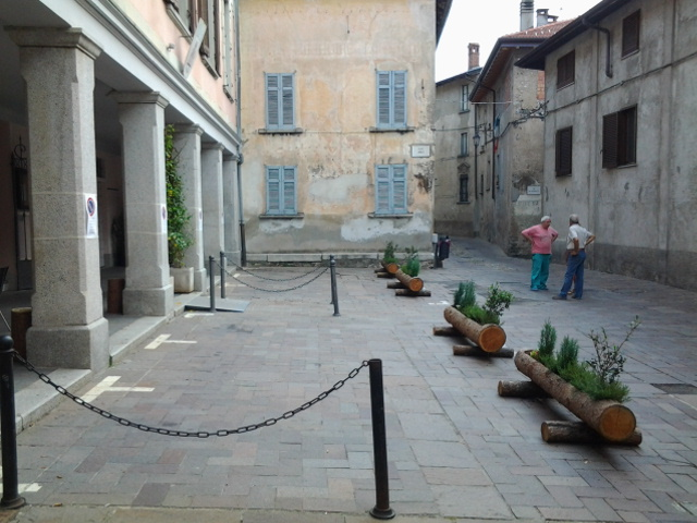 piazza liberetà castello cabiaglio